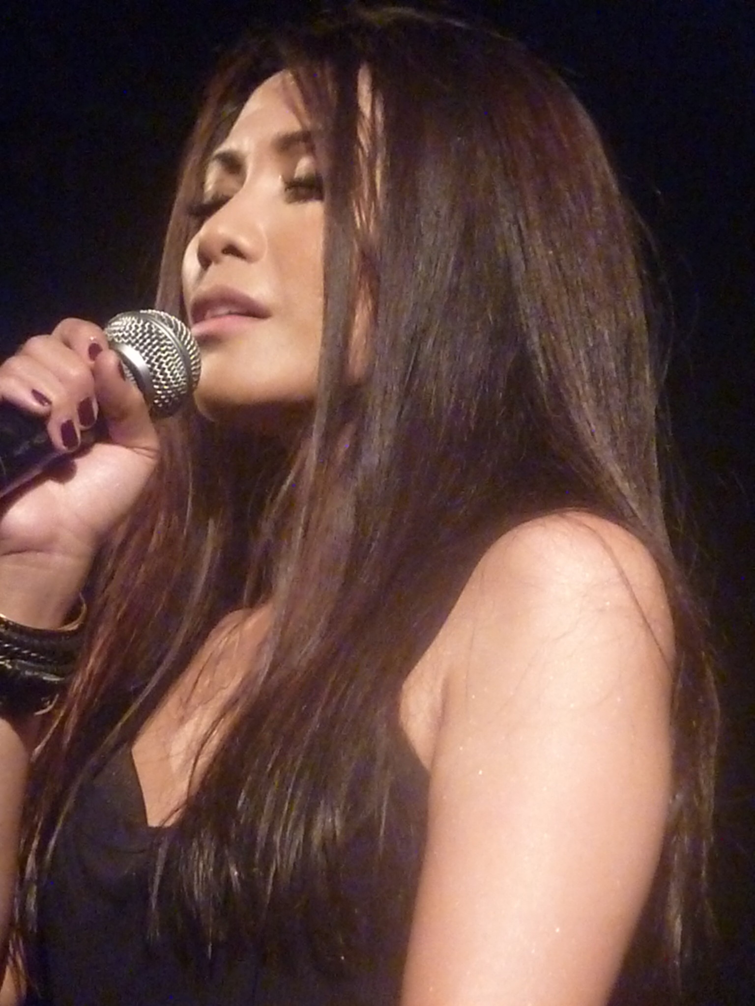 La chanteuse Anggun en concert au Trianon à paris en juin 2012